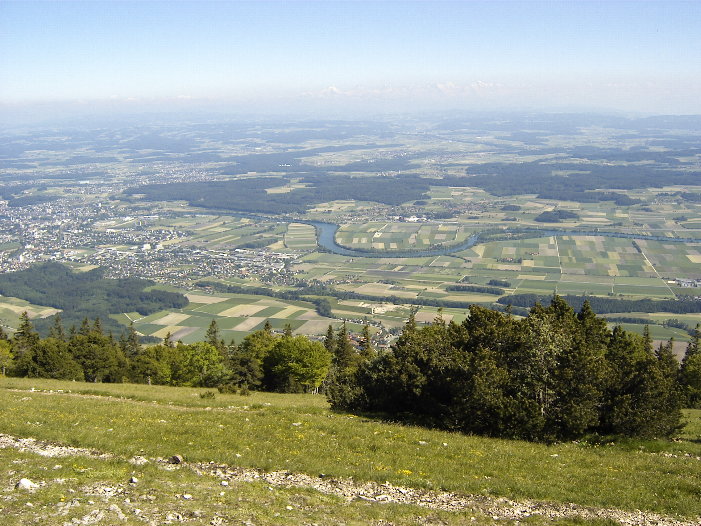 Blick über die Hasenmatt auf das Mittelland